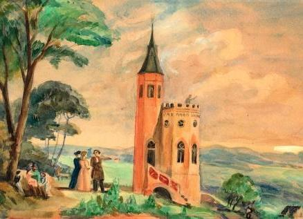 Radebeul Blechburg 1844 Aquarellentwurf Farbe